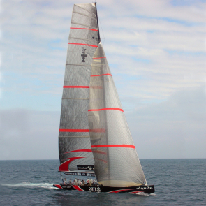 2007 - Alinghi Sui 100 - Alinghi Design Team - Photo ; Gregory Zeier - Symetrie image - Vignette carrée